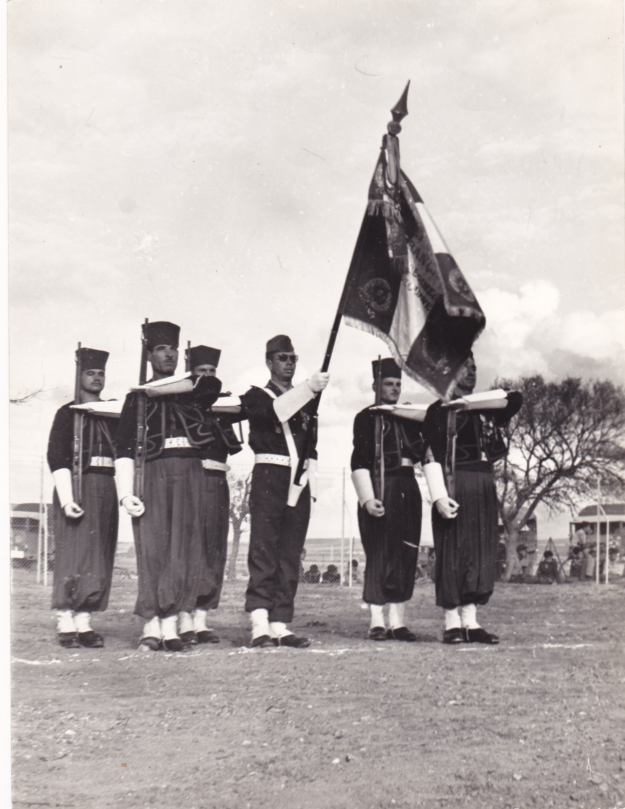 Garde d'honneur au drapeau du 4me Zouaves a l'occasion du changement et départ du commandant du bataillon